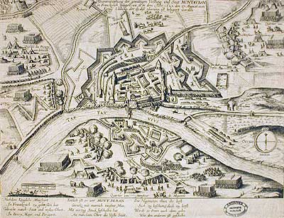 Plan du Siège de Montauban en 1621. Source : Archives départementales du Tarn-et-Garonne/ Site officiel de le préfecture de T&G. Propriété publique. ainsi que . Le tampon des archives est visible en bas à droite de l'image.